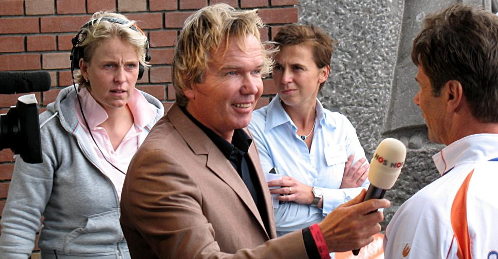 Televisiepresentator en journalist Tom Egbers tijdens de verwelkoming van de Olympische sporters na de Spelen van 2008.